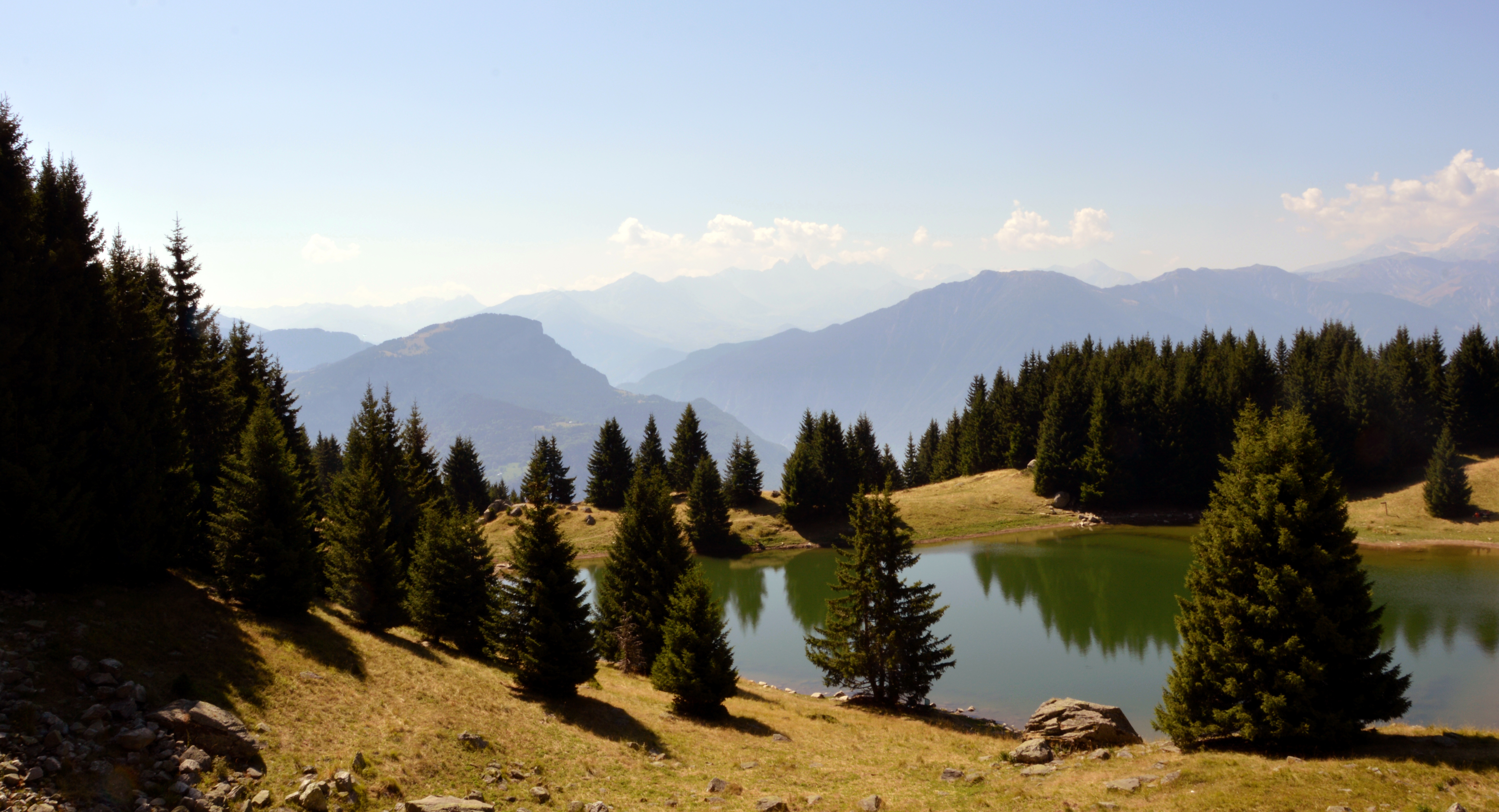 Vue du Lac de la Grande Léchère, commune de Montgellafrey, dans le massif de la Lauzière en Savoie).